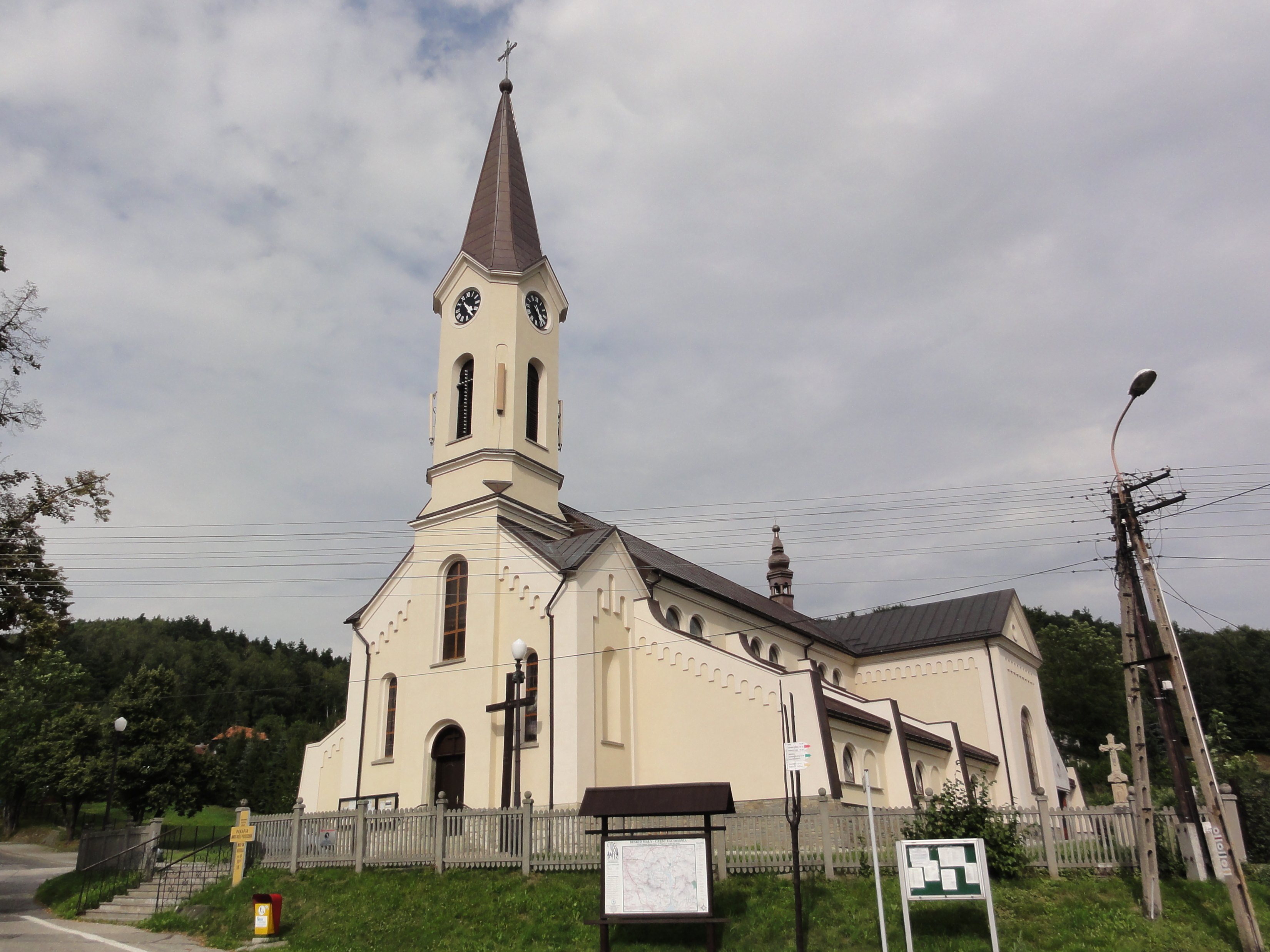 Kościół Matki Bożej Pocieszenia w Bielsku-Białej Straconce